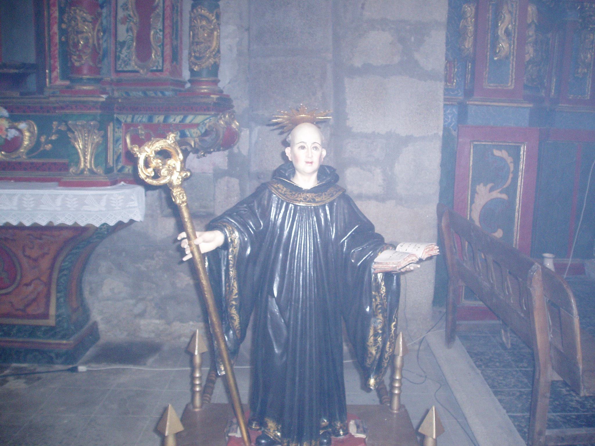 Talla de San Amaro que se venera en la Iglesia Parroquial de Santa Colomba de Sanabria, provincia de Zamora, España